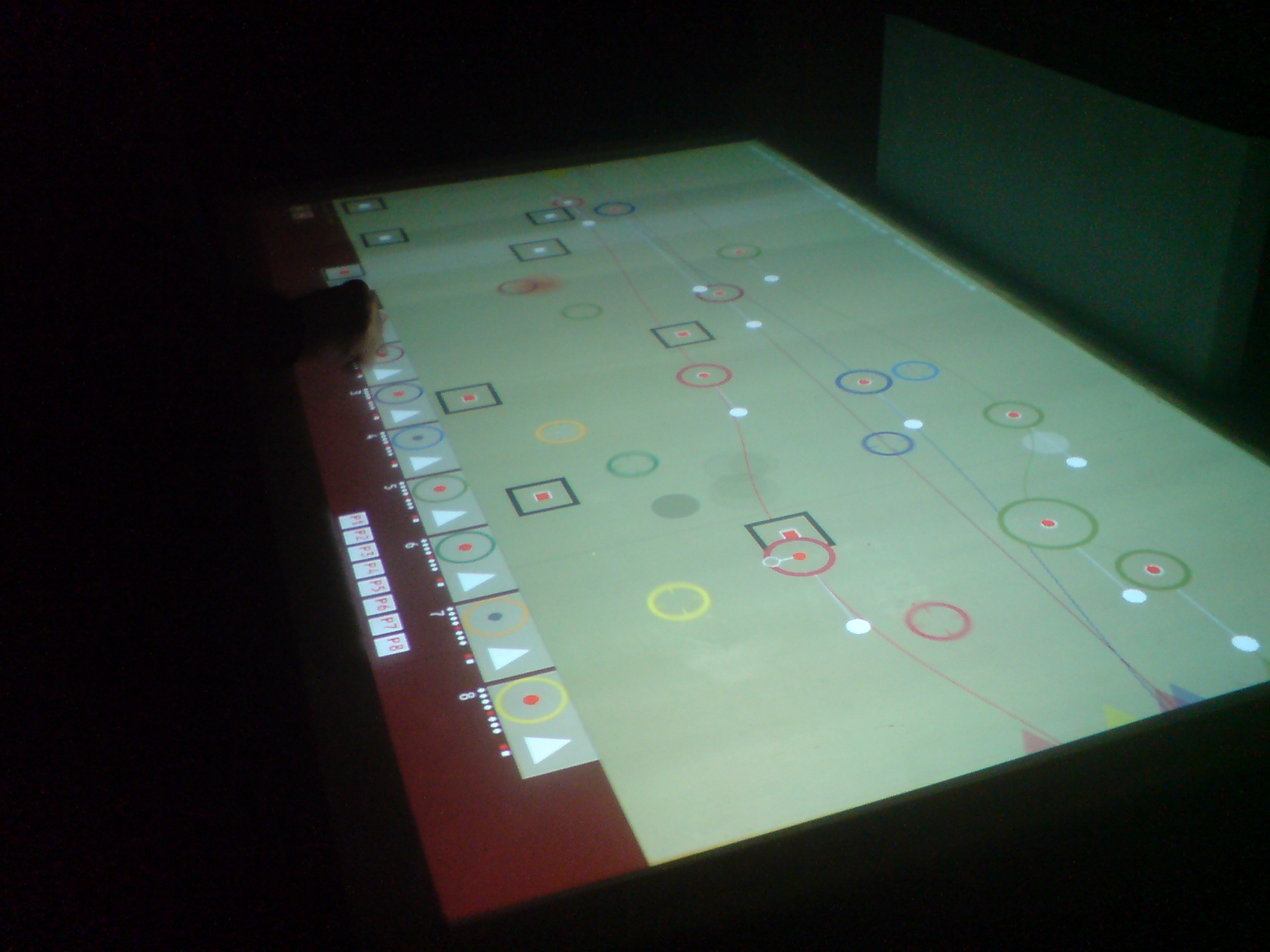 Jens@mtc